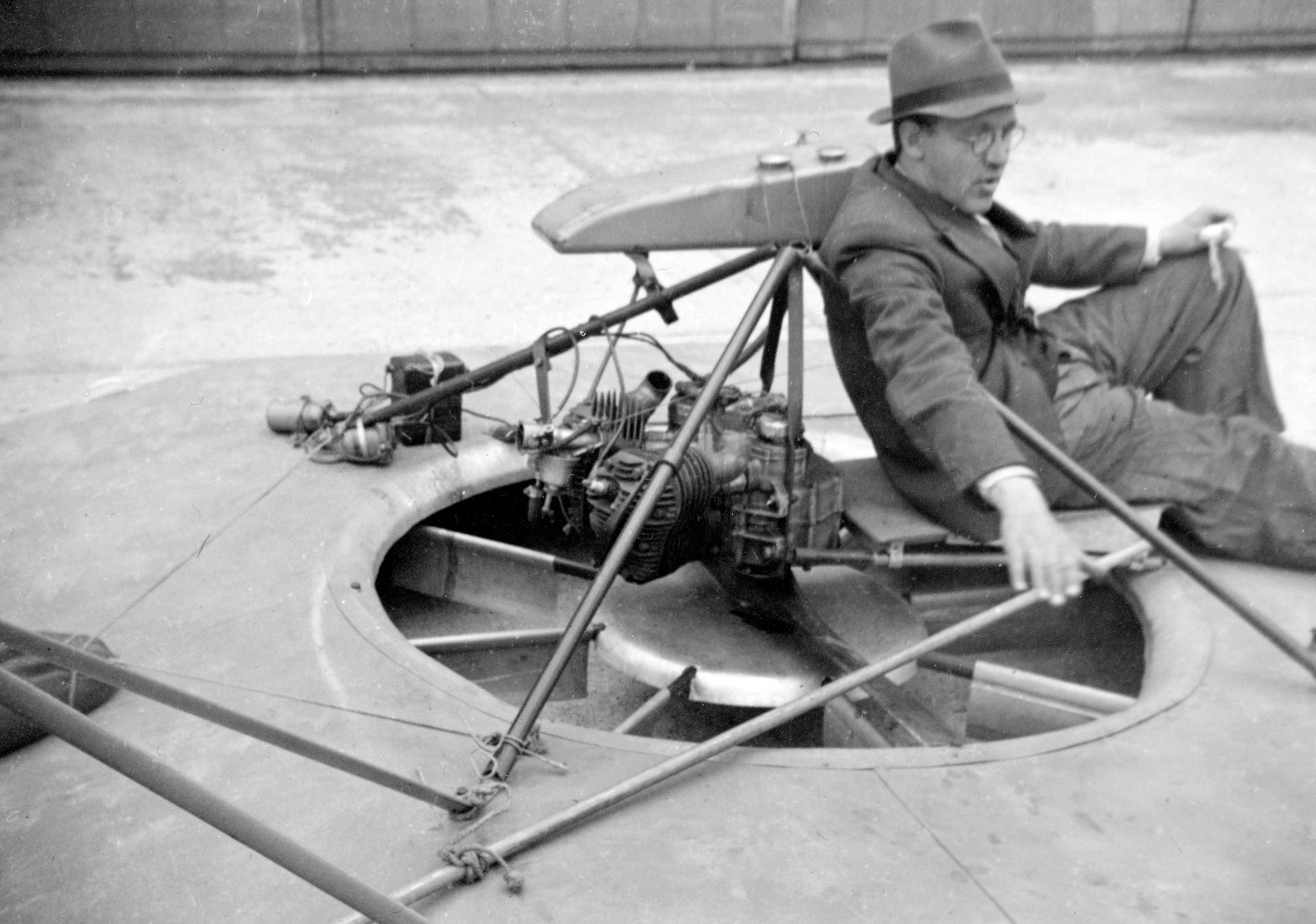 Keksijä, diplomi-insinööri Toivo Kaario (1912–1970) ja hänen kehittelemänsä ilmatyynyalus eli pintaliitäjä, ”lentävä lavitsa”.